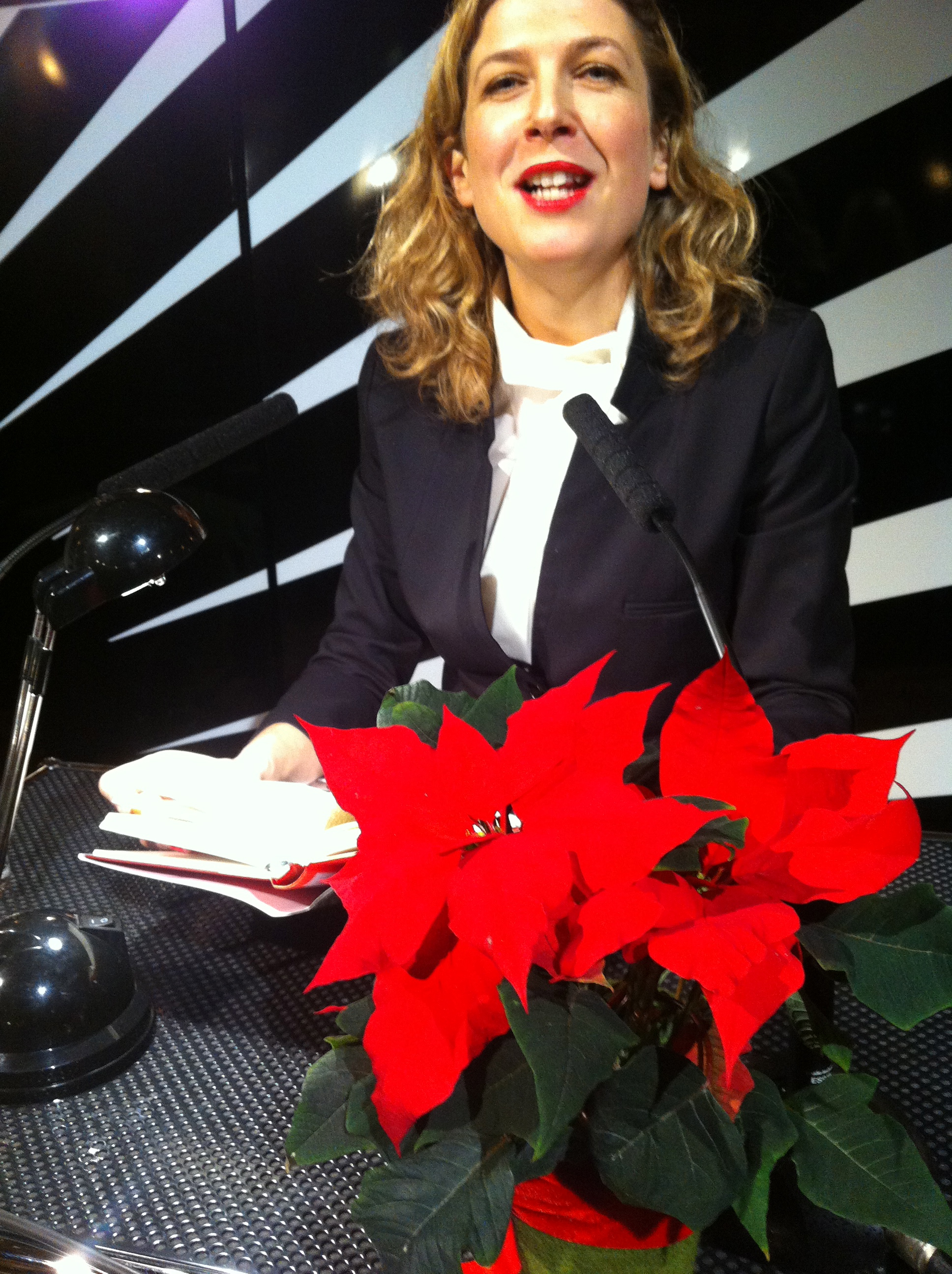 Carmen Stephan, Jürgen-Ponto-Preisverleihung 2012